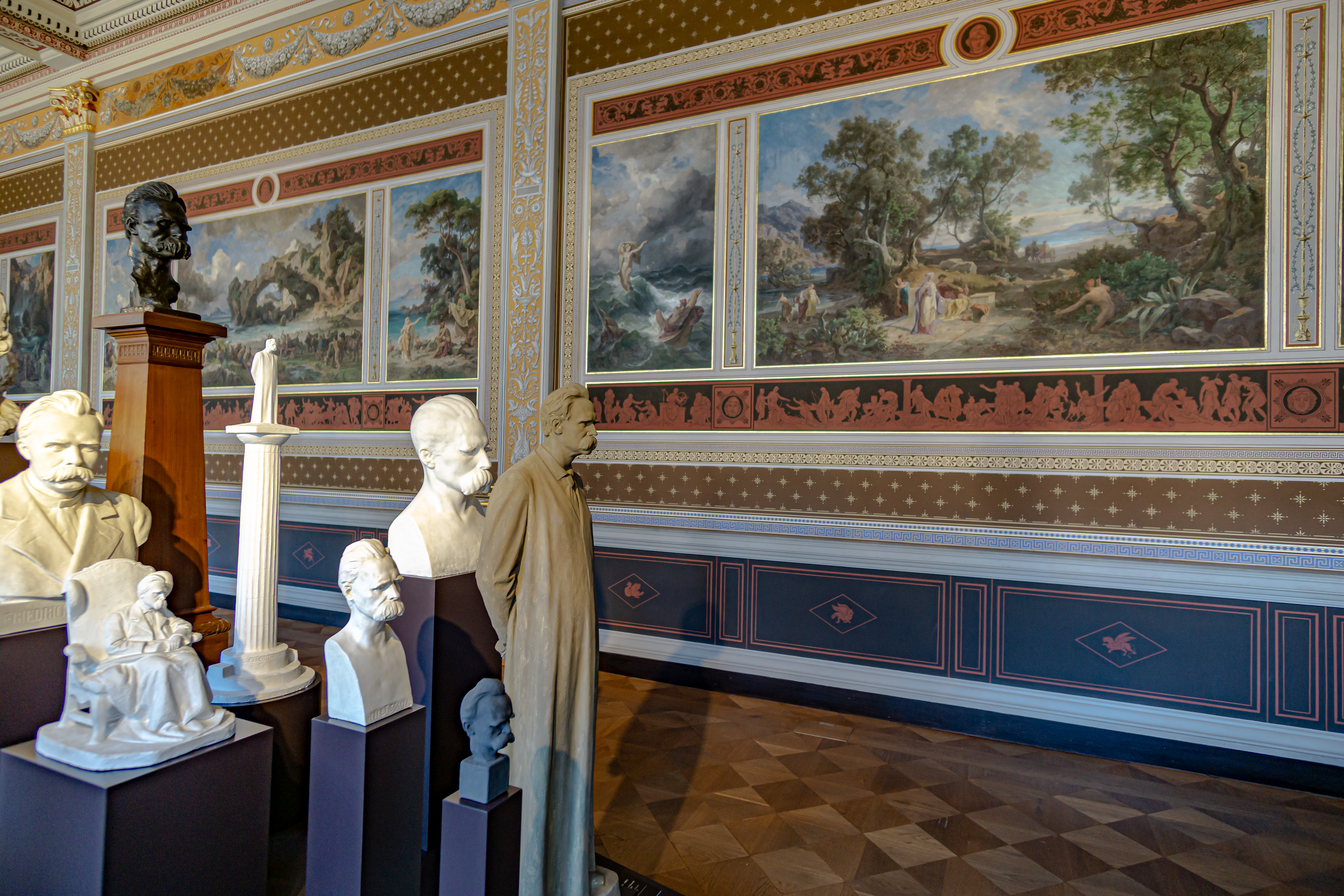 Statuen von Friedrich Nietzsche vor Wandbildern von Friedrich Preller dem Älteren im Neuen Museum Weimar